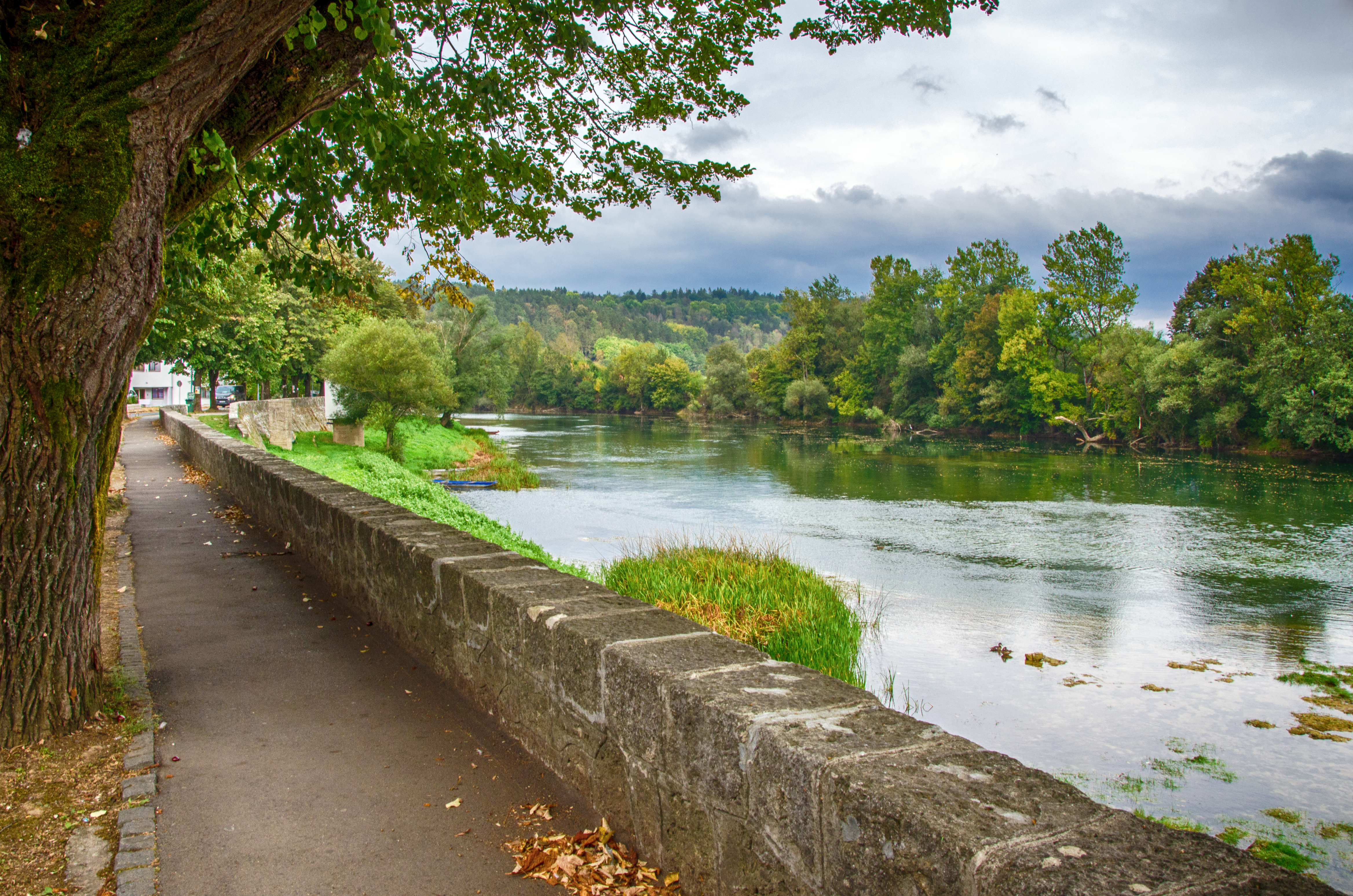 This image was uploaded as part of Trace of Soul 2018. .Kej Novi Grad